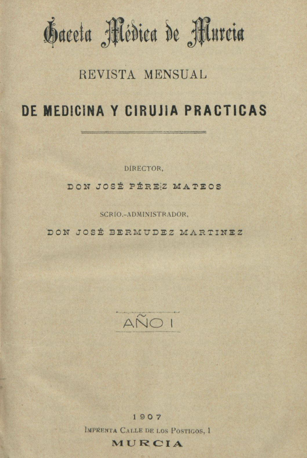 Portada de la revista Gaceta Médica de Murcia; publicada en Murcia en 1907, siendo su director el Dr. José Pérez Mateos.